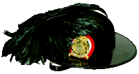 Cappello piumato bersaglieri dell'esercito italiano